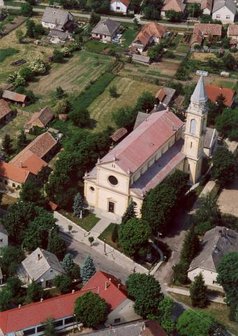 Döbrököz, Hungary, aerial photography. Szent Imre római katolikus templom